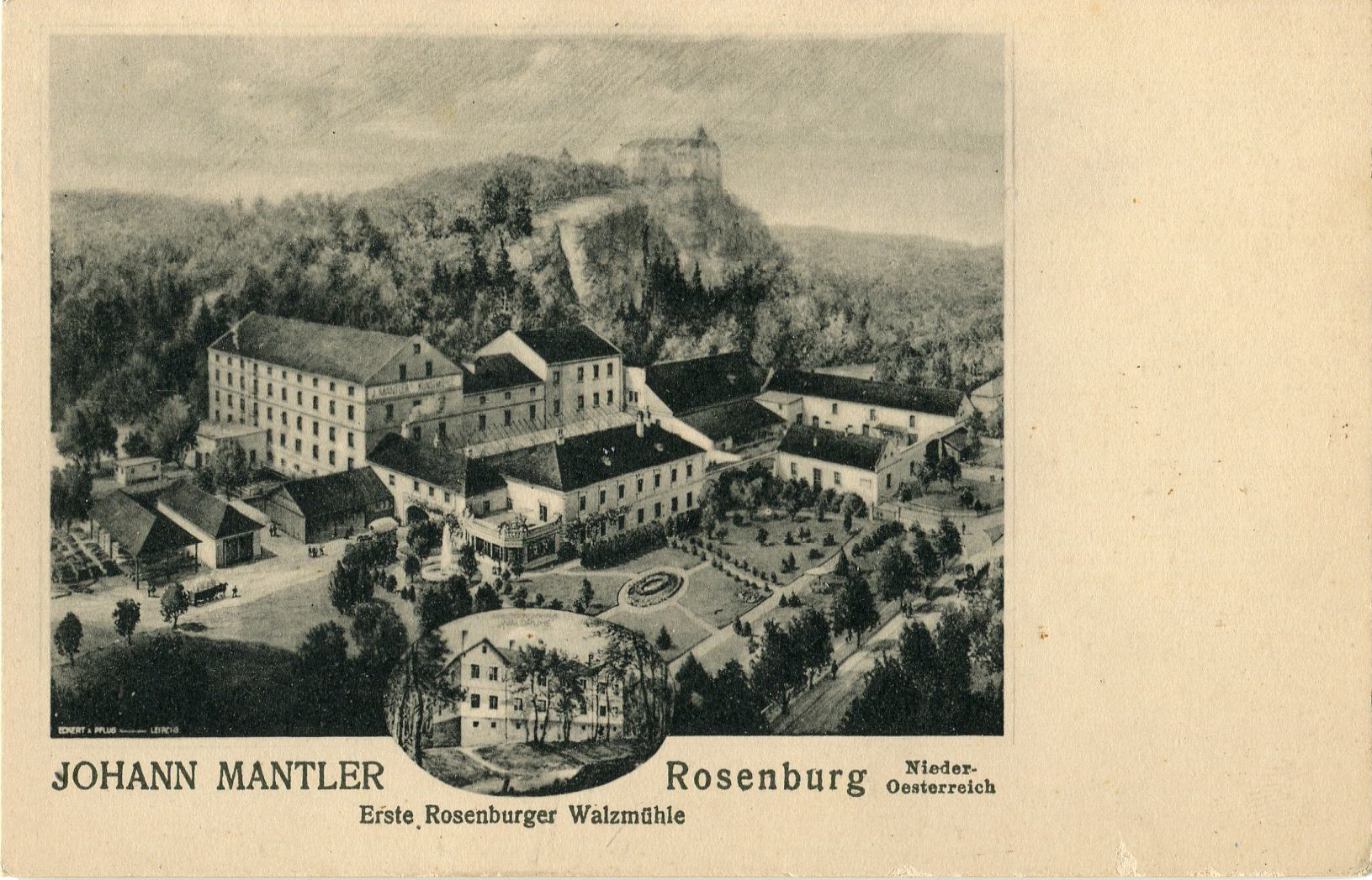 Die Mantler-Mühle in Rosenburg um 1920, Werbe-Ansichtskarte